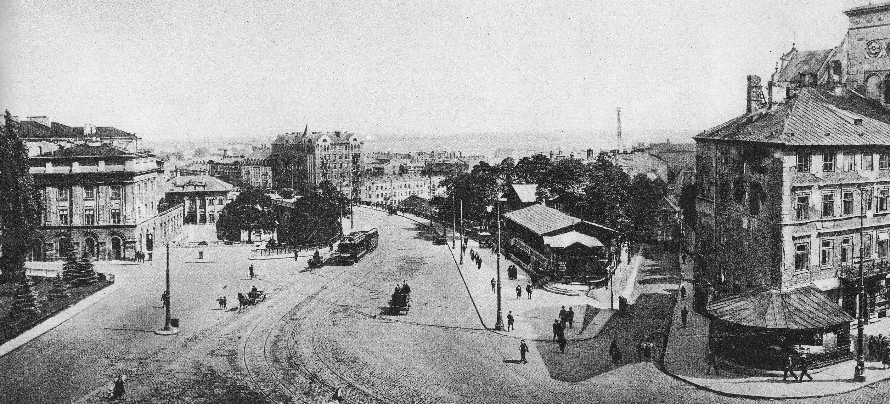 Ulice Nowy Zjazd i Mariensztat w Warszawie